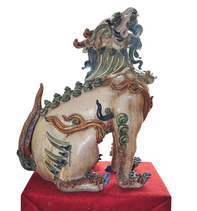 Nghê đại cổ, làng gốm sứ Thanh Hải, kích thước lớn cao 1.13 m, nặng đến 120kg. Con nghê đại cổ thường đặt ở các công trình lớn như đình, chùa